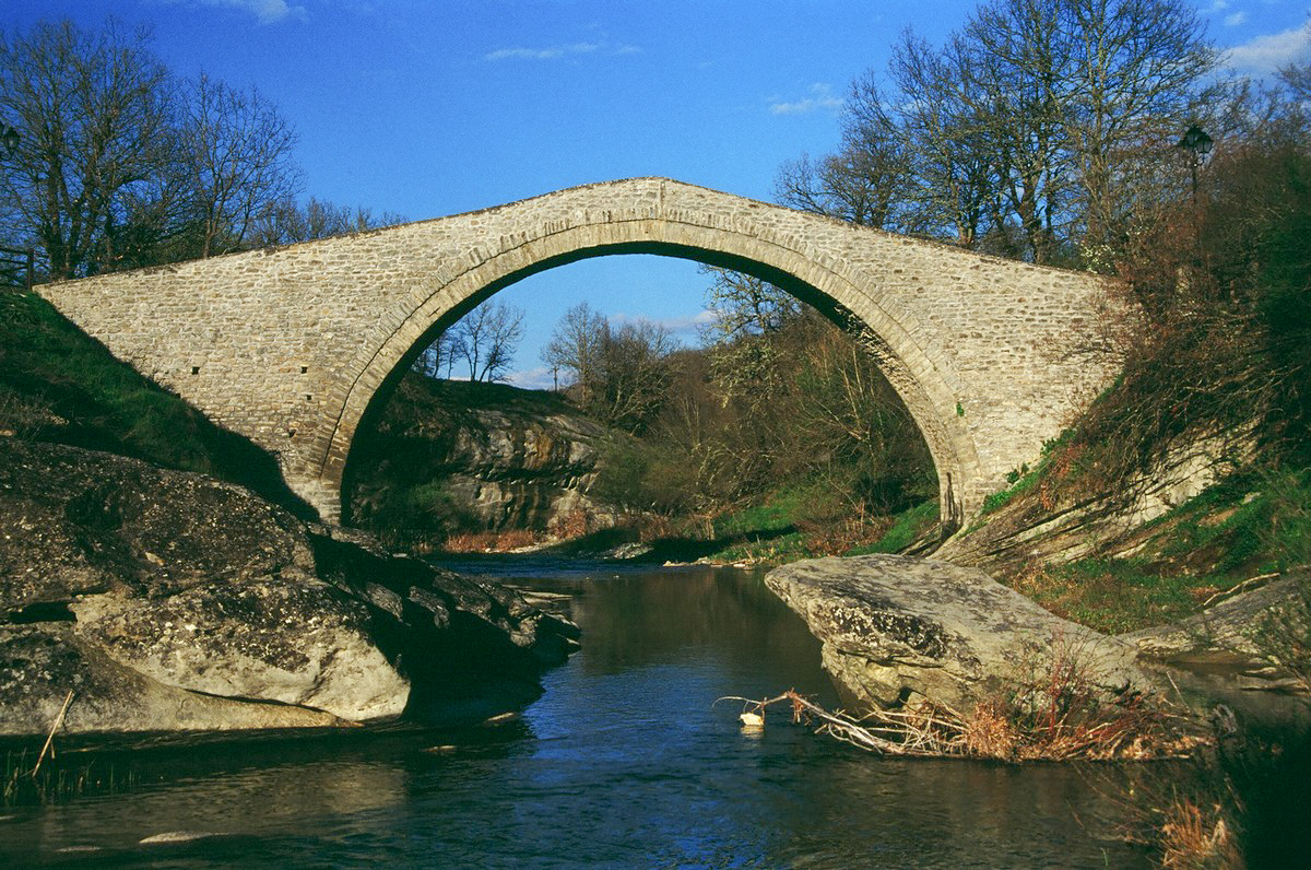 Το μεγάλο πέτρινο γεφύρι της Χρυσαυγής